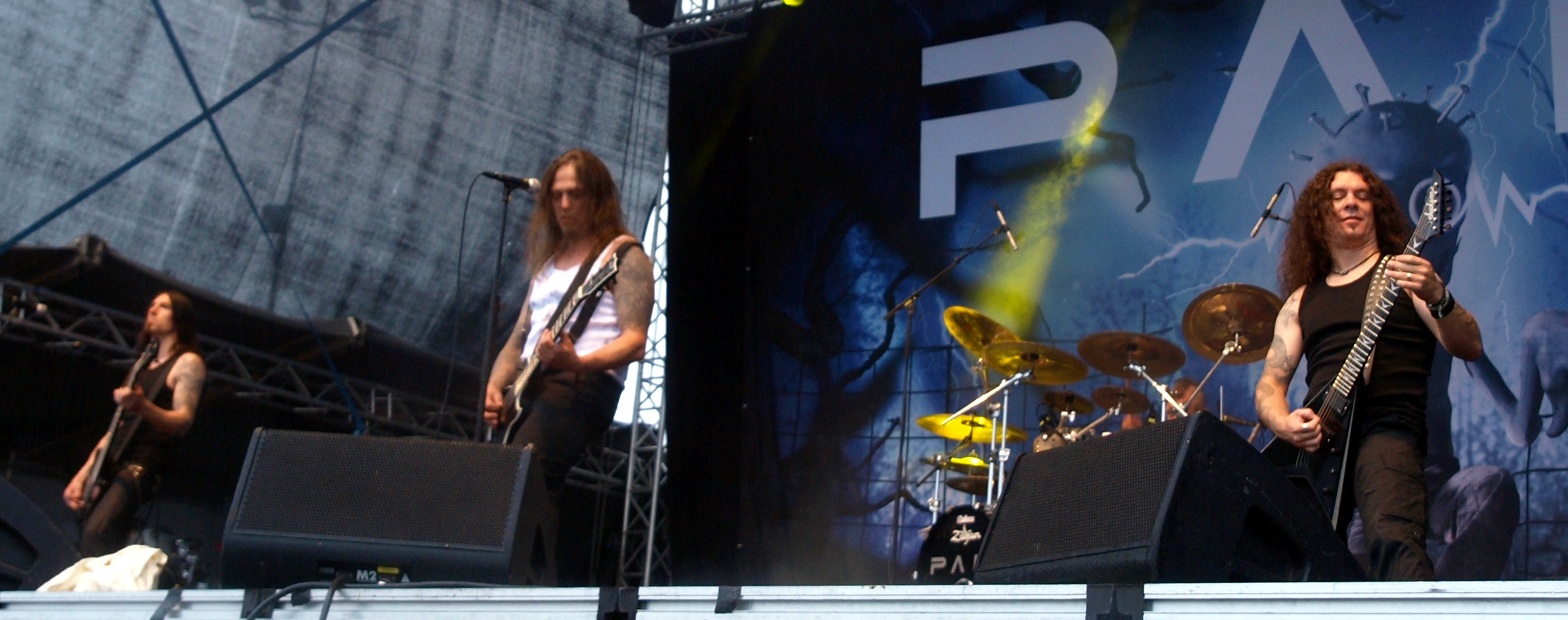 Pain live am Myötätuulirock 2011